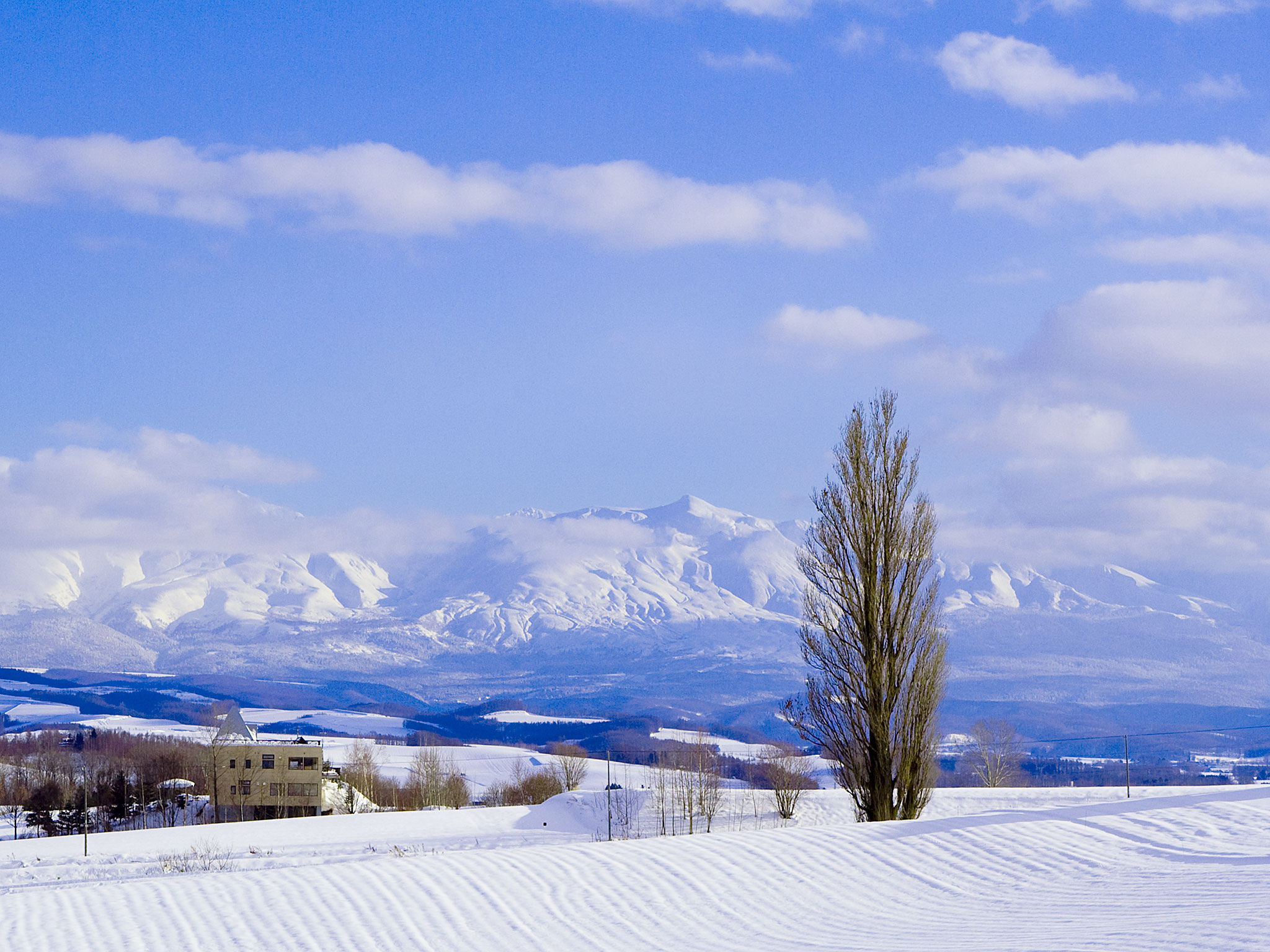 冬の美瑛町ケンとメリーの木